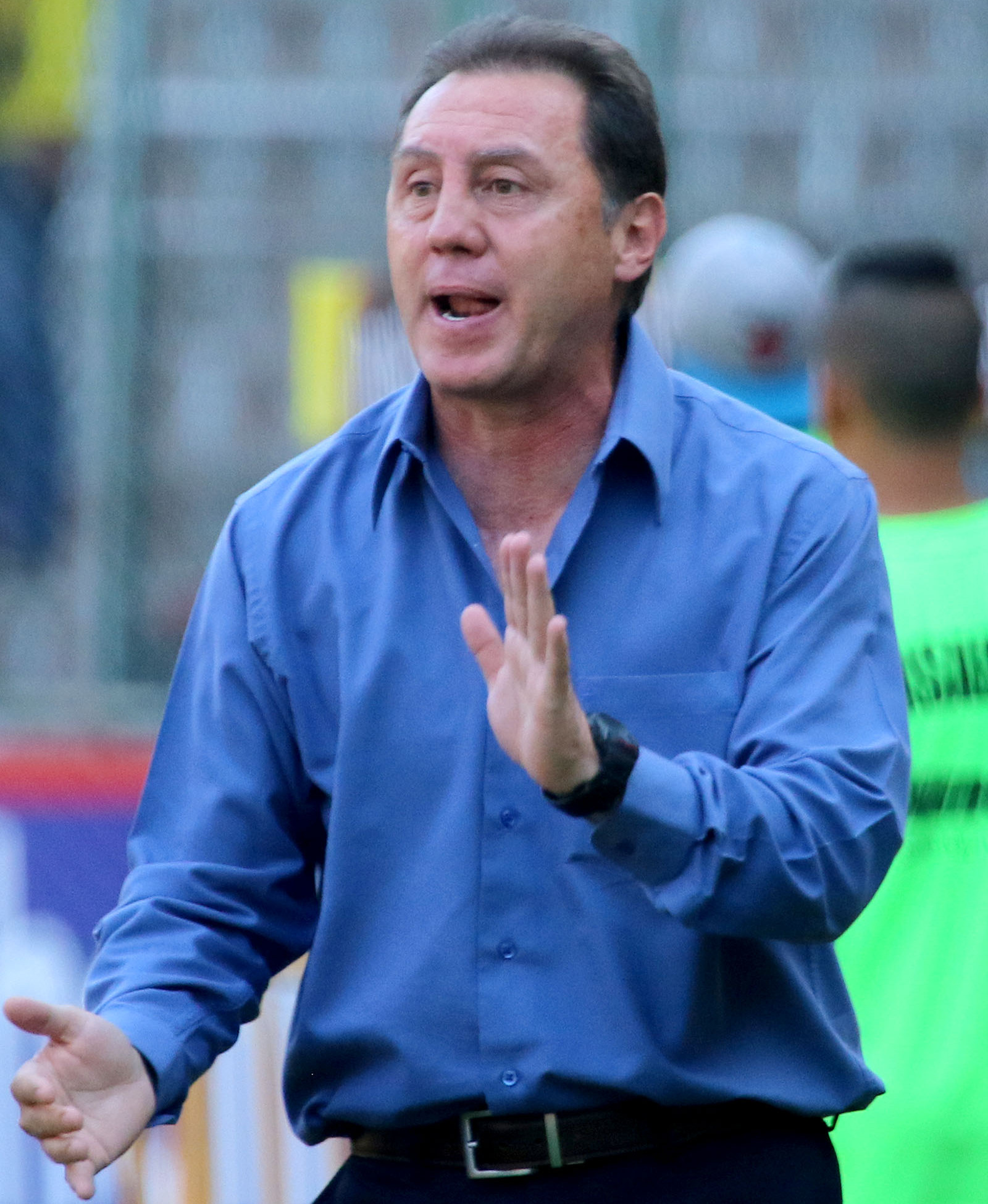 Guayaquil, 20 de sept. del 2015 (Andes).-El DT. Alex Aguinaga, durante el encuentro entre Barcelona y Deportivo Cuenca en la onceava fecha del campeonato ecuatoriano de fútbol Foto:César Muñoz/Andes